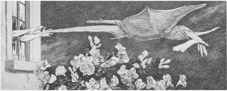 Klinger: "Entführung", aus der Folge "Ein Handschuh", 1881 (Radierung) (GNU-FDL, der Künstler ist über 70 Jahre tot)